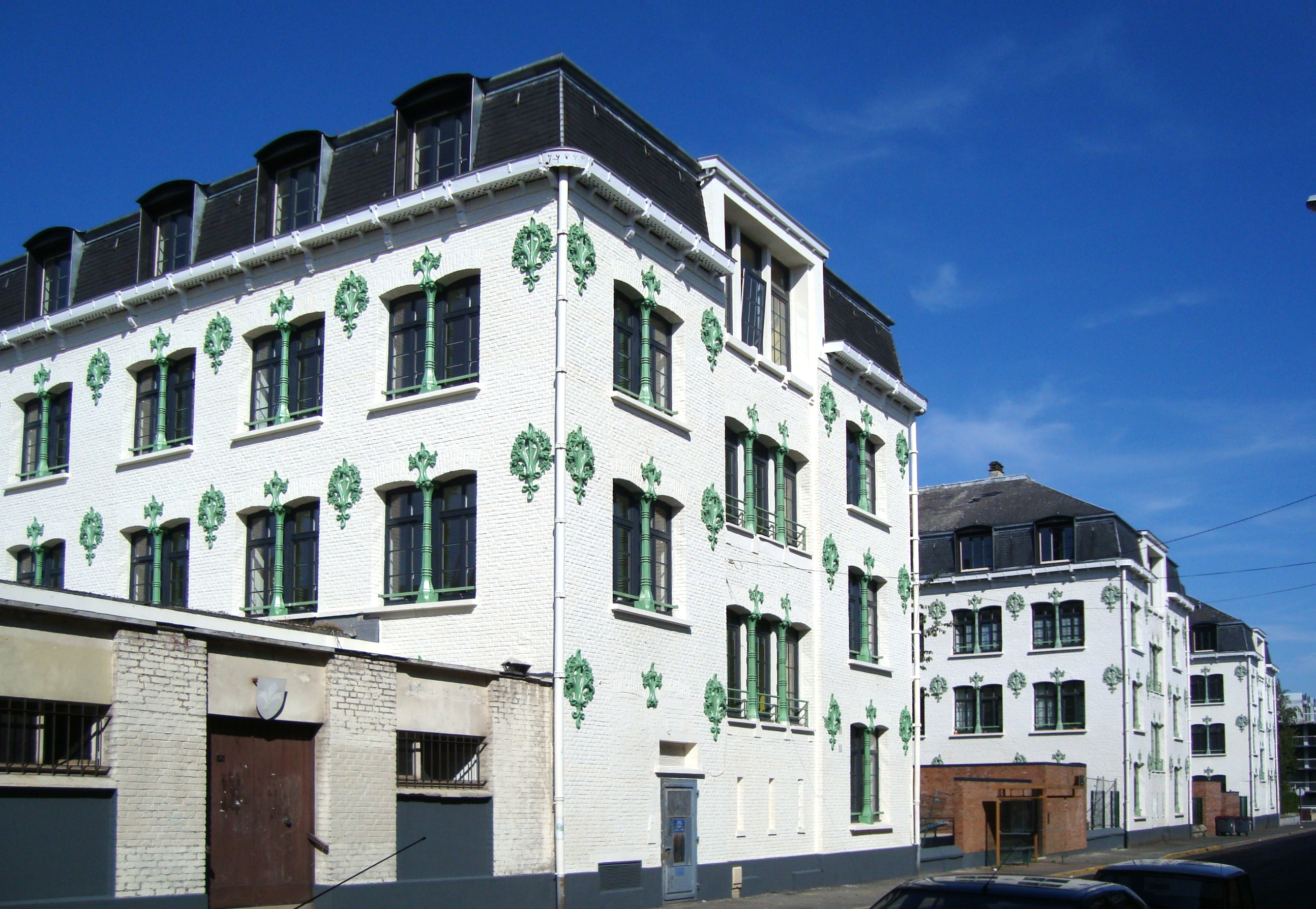 La cité philanthropique rue Gantois dans le quartier de Wazemmes à Lille (Nord).